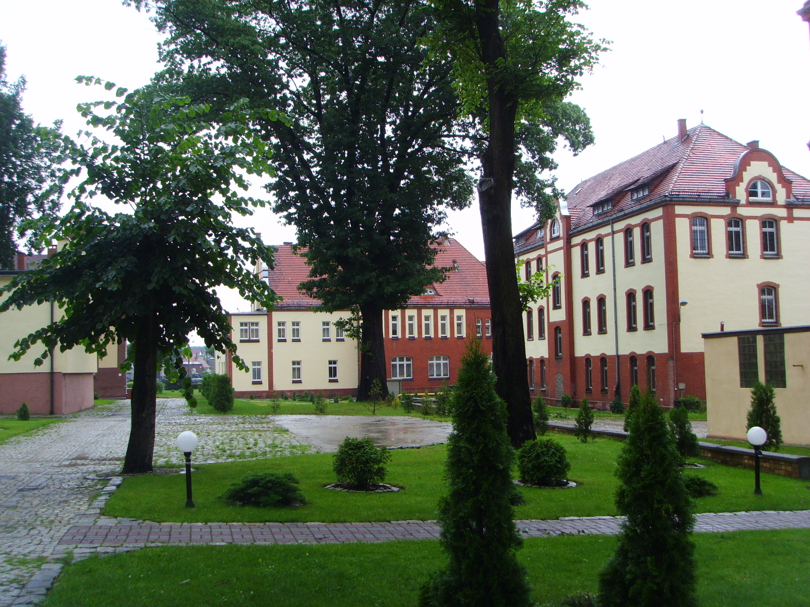 Budynki Nadodrzańskiego Oddziału Straży Granicznej w Krośnie Odrzańskim